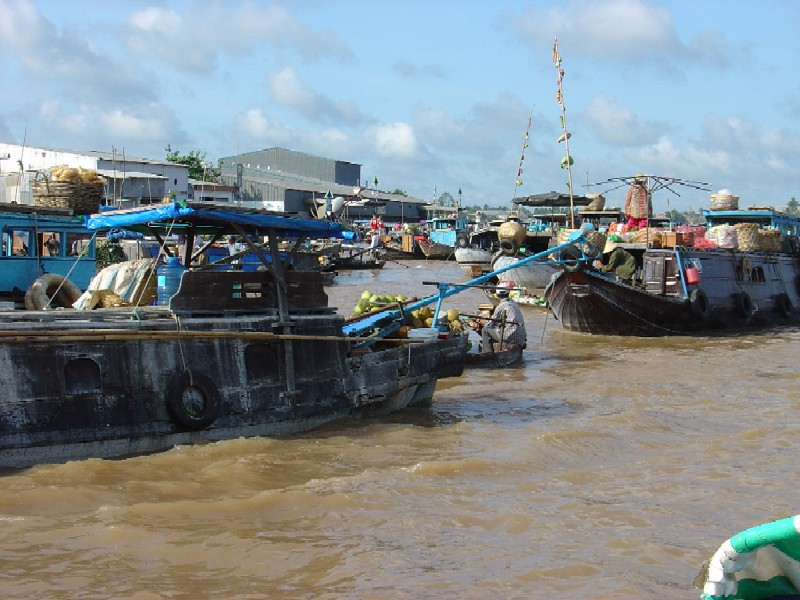 Gemaakt door Trần Đăng Khoa en door hemzelf vrijgegeven onder GFDL (zie Hình:Cho noi (Cai Rang, Can Tho).JPG voor zijn eigen verklarin).